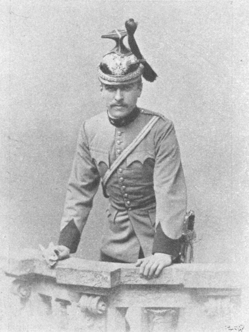 Hugo von Hofmannsthal (1874–1929) in Uniform (ca. 1900)